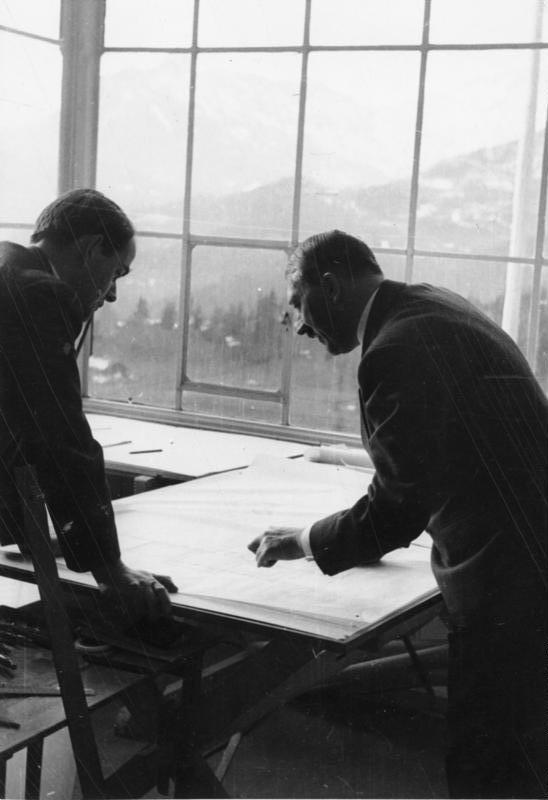 Obersalzberg, Albert Speer, Adolf Hitler Adolf Hitler und Albert Speer. [Obersalzberg.- Adolf Hitler und Albert Speer über Plänen im Berghof, 1938] Abgebildete Personen: Hitler, Adolf: Reichskanzler, Deutschland Speer, Albert Prof. Dr.: Reichsminister für Rüstung und Kriegsproduktion, Architekt, Deutschland (GND 118615998)